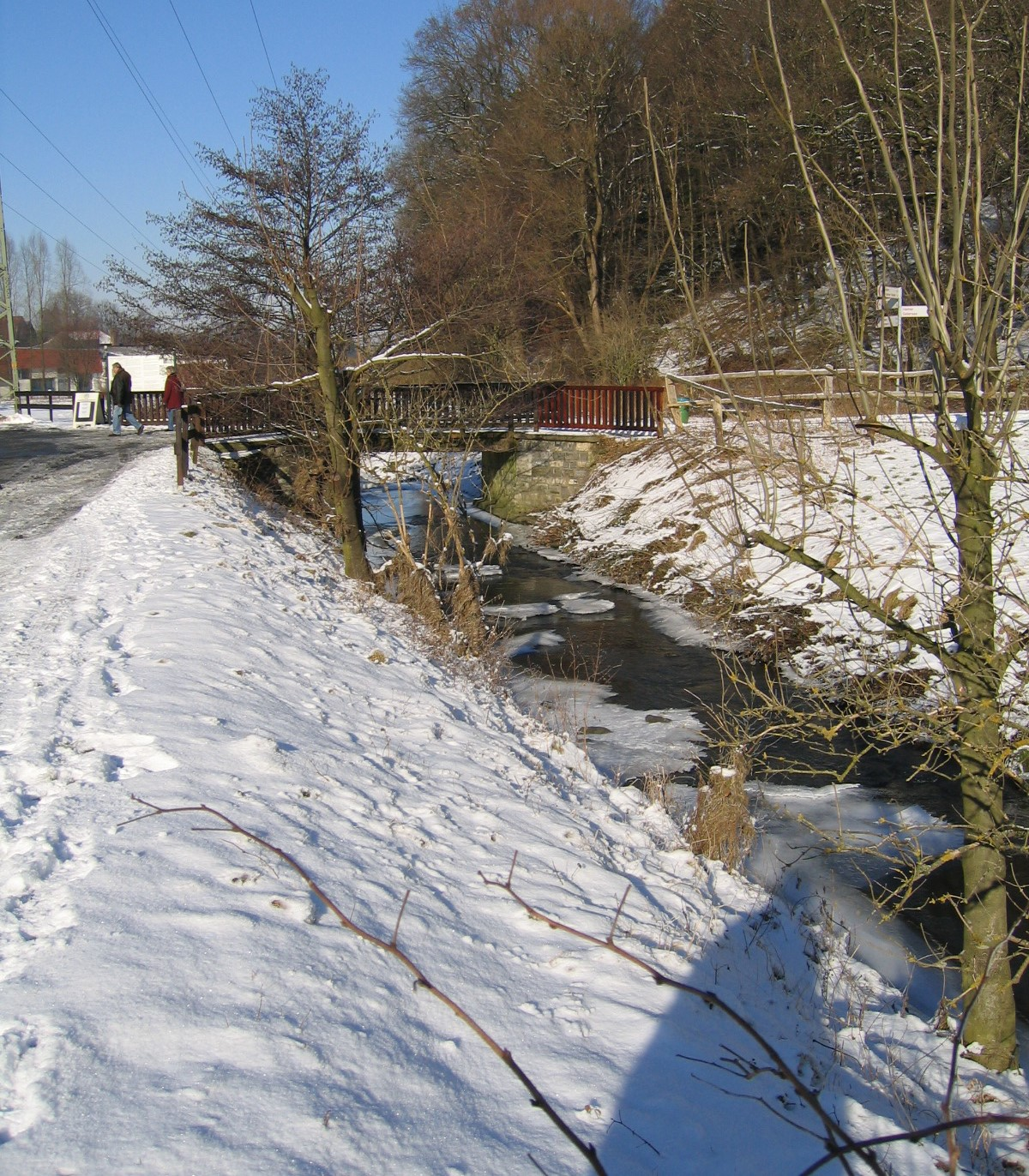 Description: Der Baarbach bei Iserlohn-Barendorf. Source: selbst fotografiert Date: 29. Jan. 2006 Author: Bubo